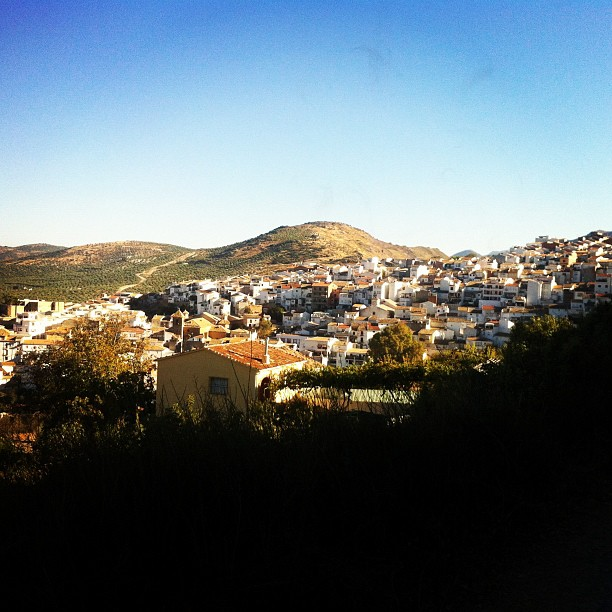 Castillo de Locubín, Jaén, España.